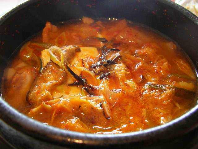 Kimchi Stew (Kimchi Jigae)kimchee chige /